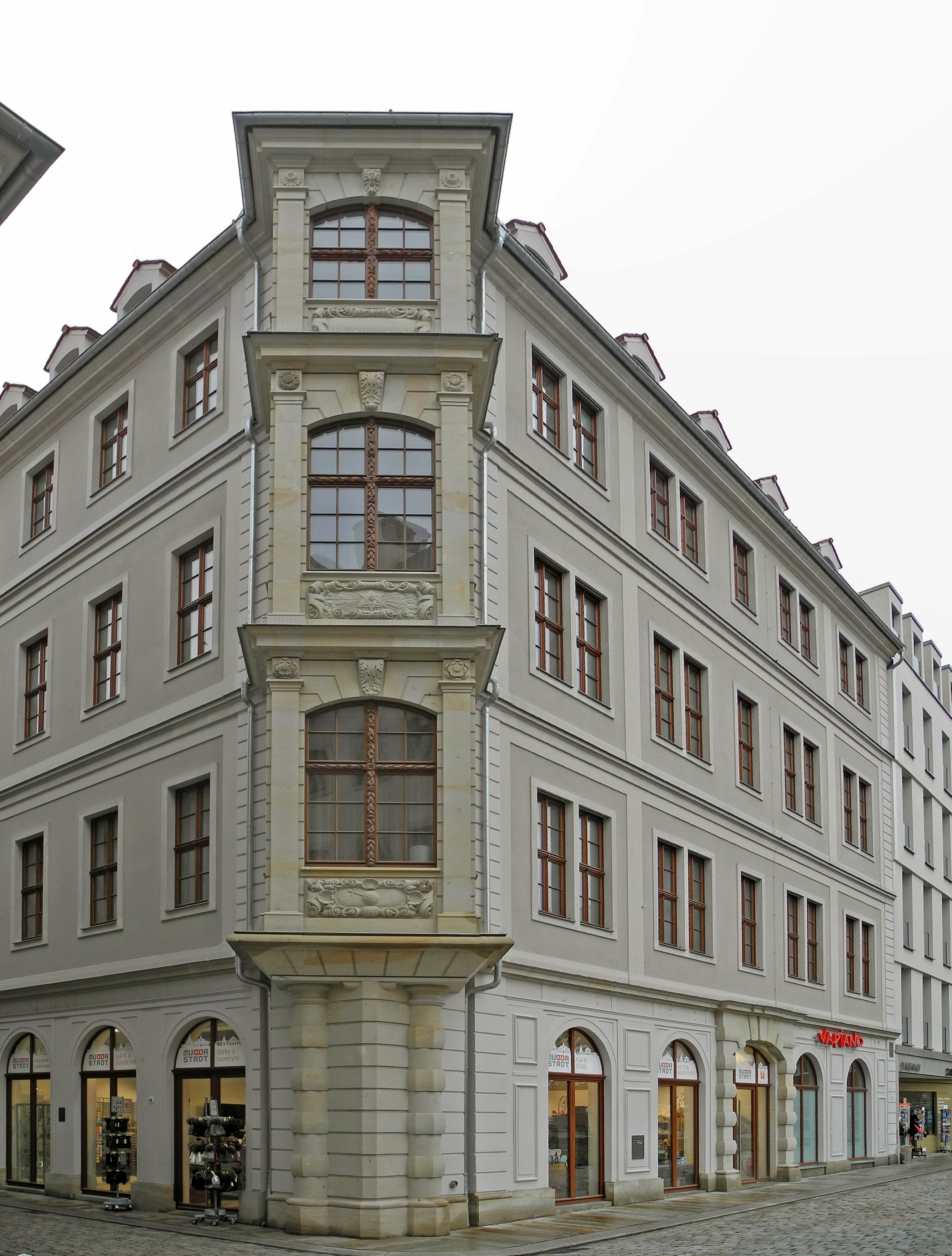 Das Triersche Haus in Dresden, Sporergasse 12, errichtet 1695 für Johann Friedrich Trier, 1945 zerstört, 2017 wieder errichtet.